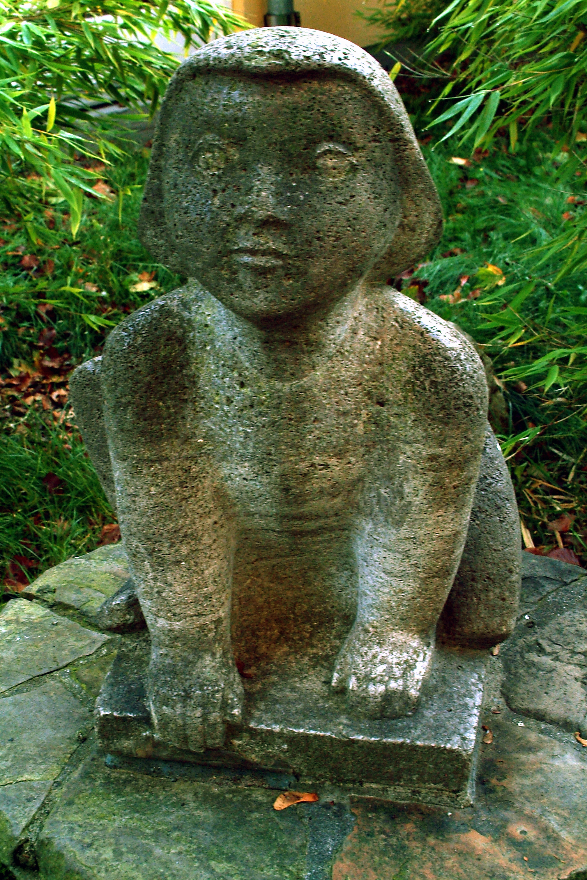 Die Skulptur Hockendes Kind von Reinhold Kniehl in der Frontalansicht.